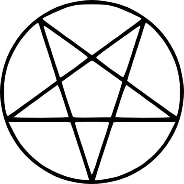 pentagrama invertido del satanismo y la magia negra